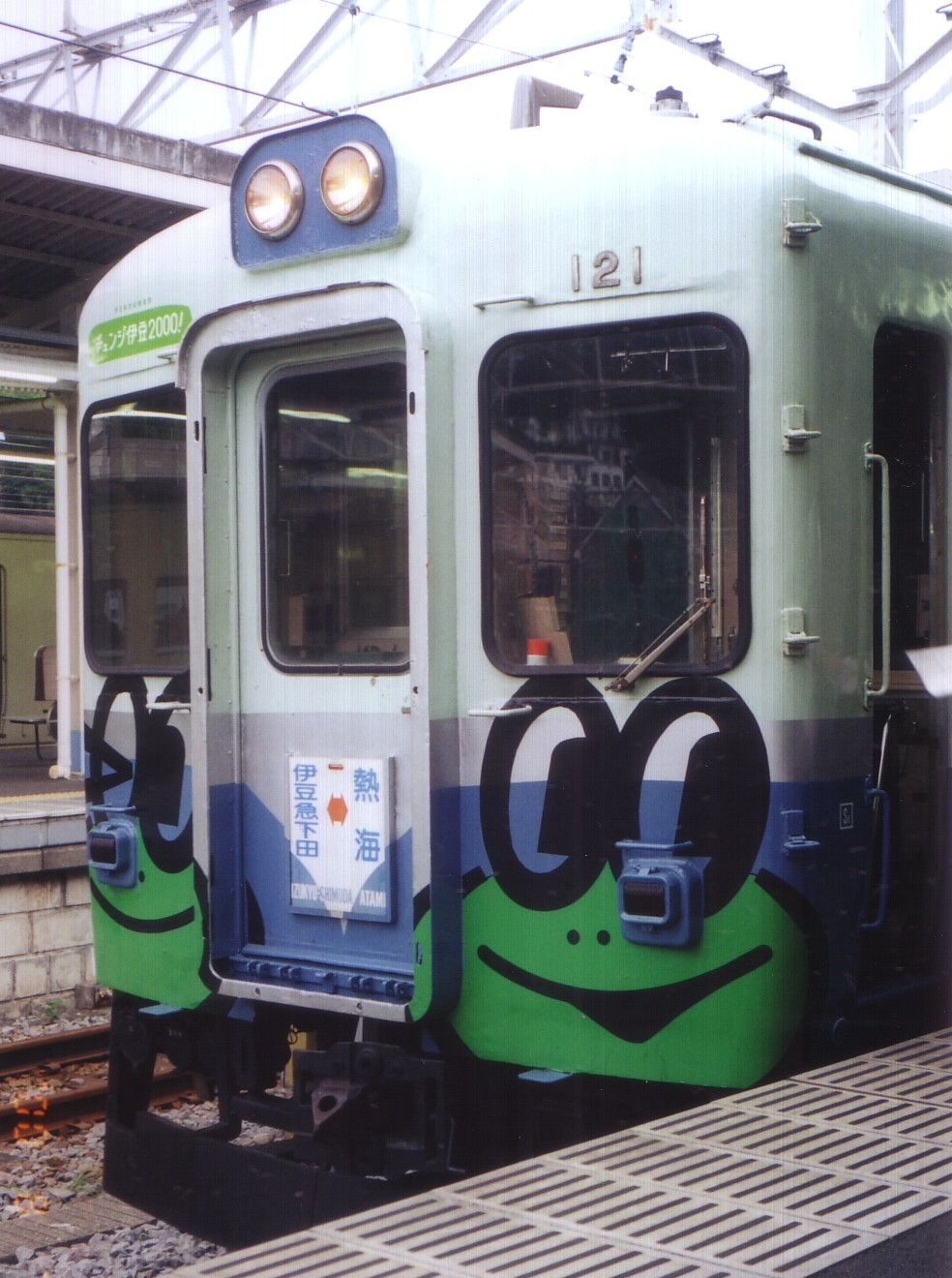 伊豆急行100系「イズノスケ号」